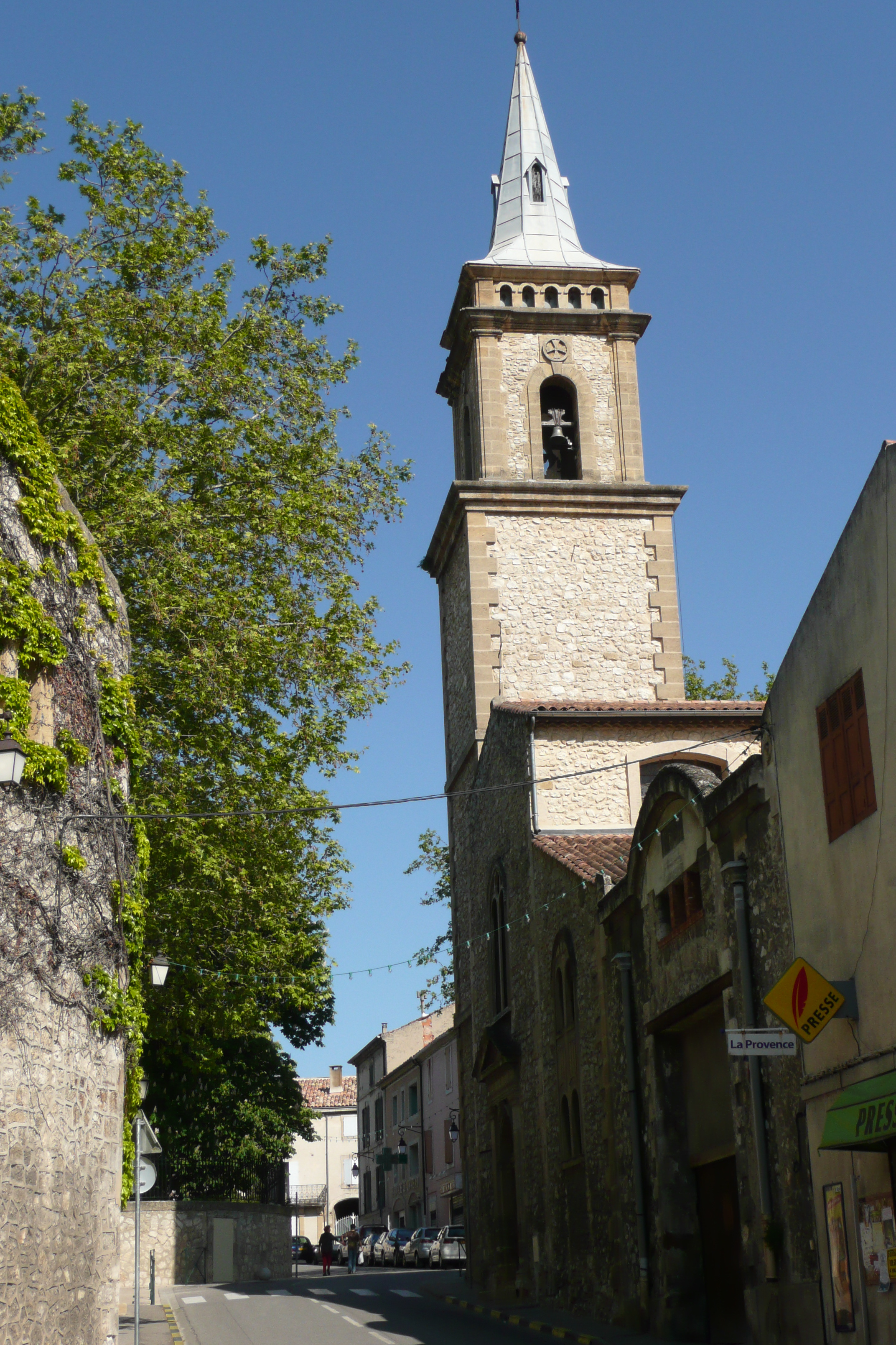 Eglise à La Roque d'Anthéron.